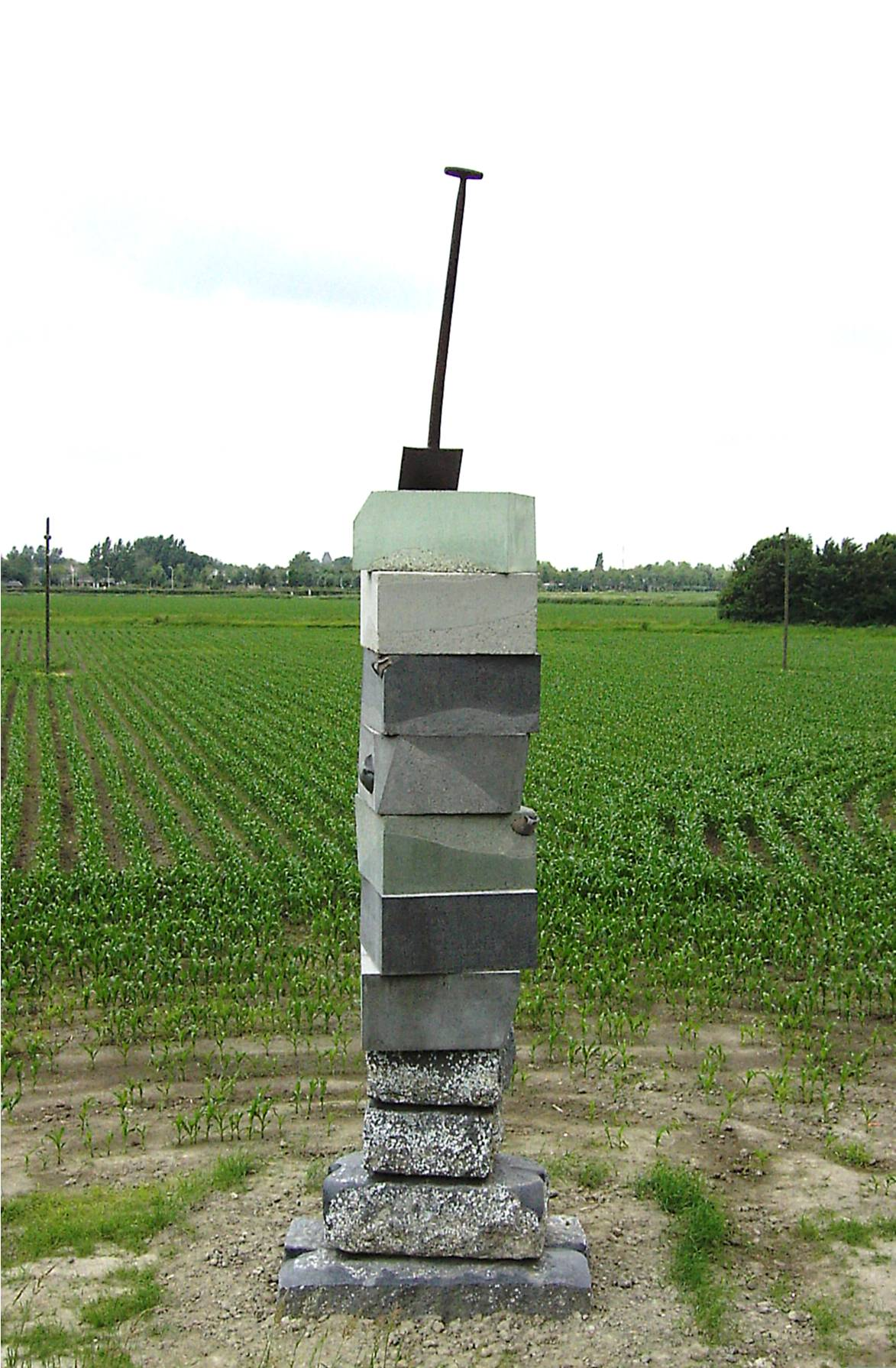 Jan Pieter de Graaf,2006